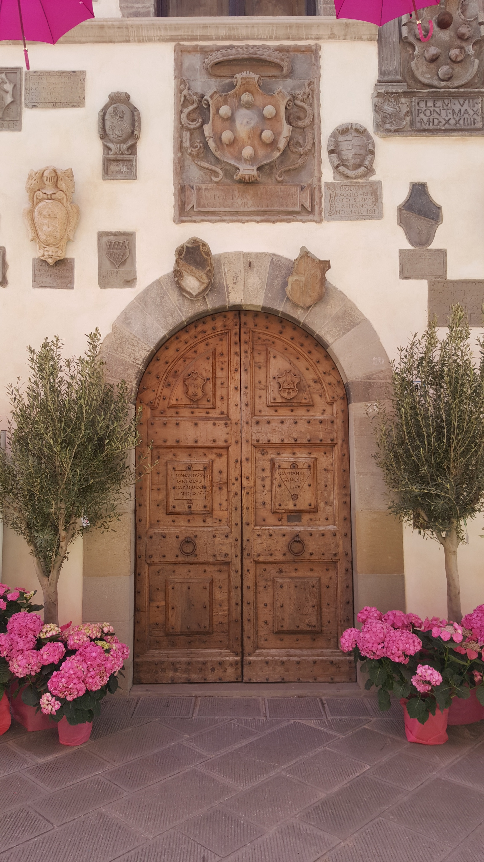 Un misterioso imprenditore a donato ortensie e ulivi per ornare e valorizzare i monumenti di Bagno di Romagna e di San Piero in Bagno per il Giro d'Italia (17 maggio 2017) This is a photo of a monument which is part of cultural heritage of Italy.